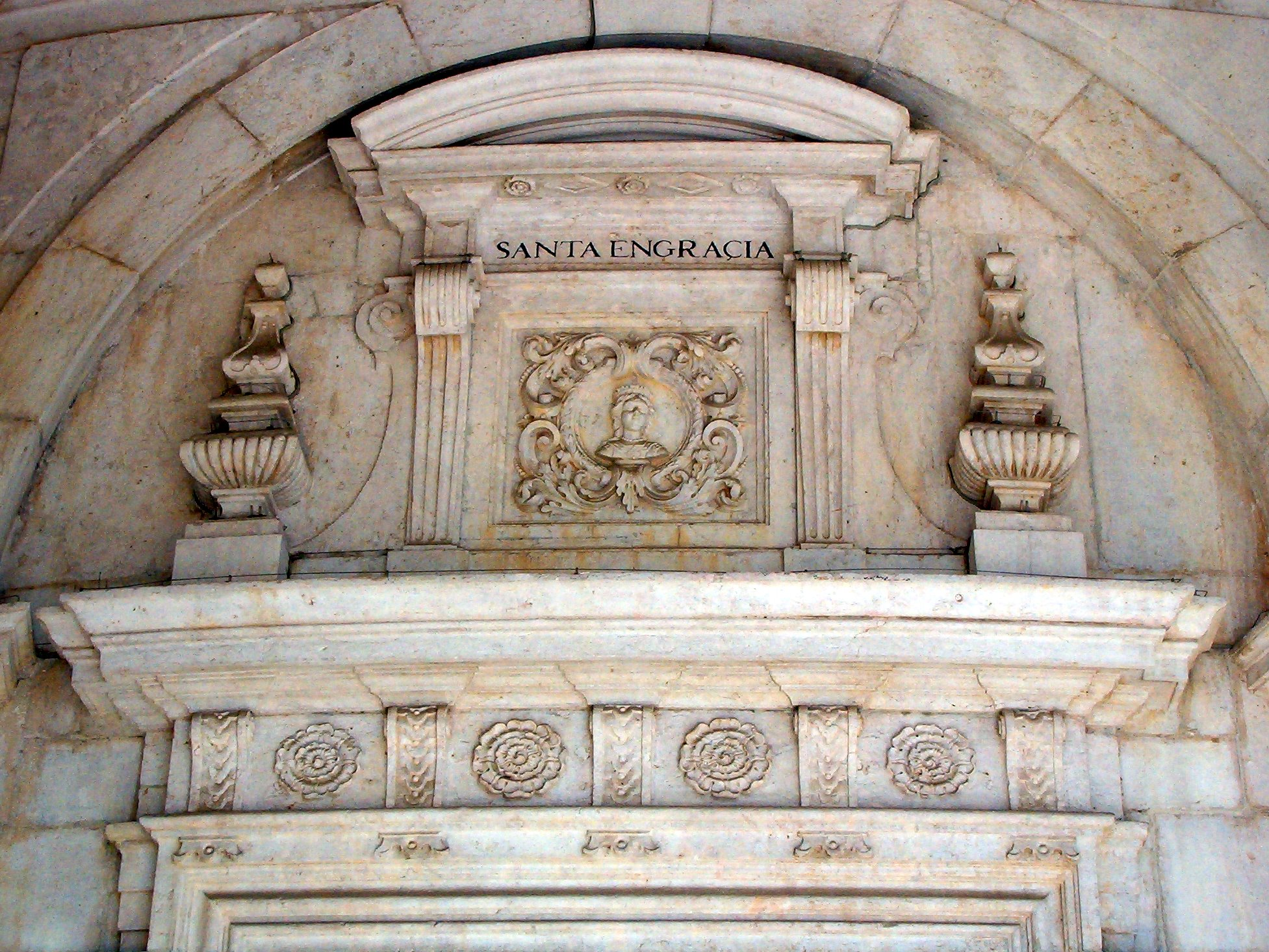 Panteão Nacional (elemento da entrada principal).JPG